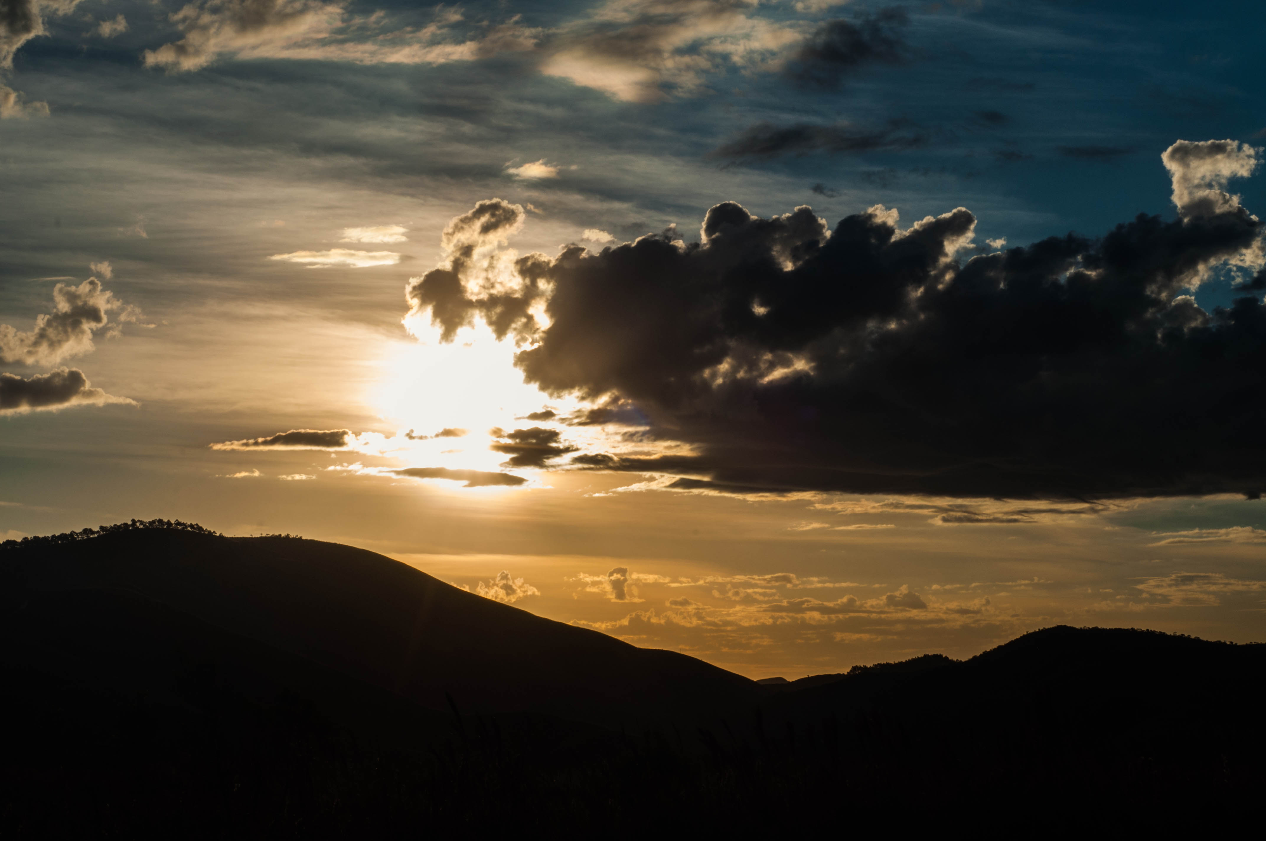 Serra da Chapada, localizada em Lavras Novas, Minas Gerais